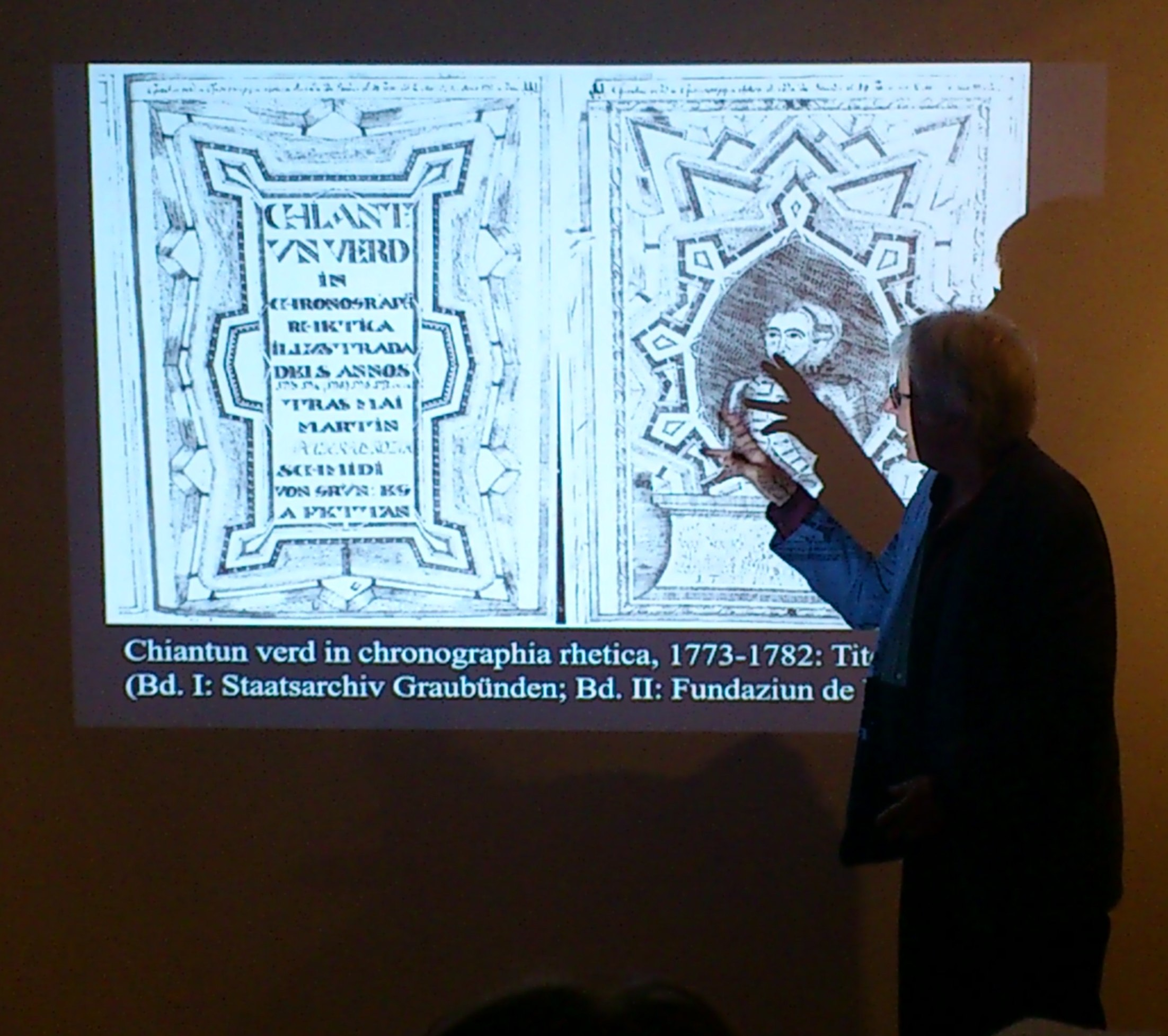 Der Schweizer Historiker Jon Mathieu (* 1952) spricht über die romanische Handschrift Chiantun Verd von Martin Peider Schmid (1743-1821).